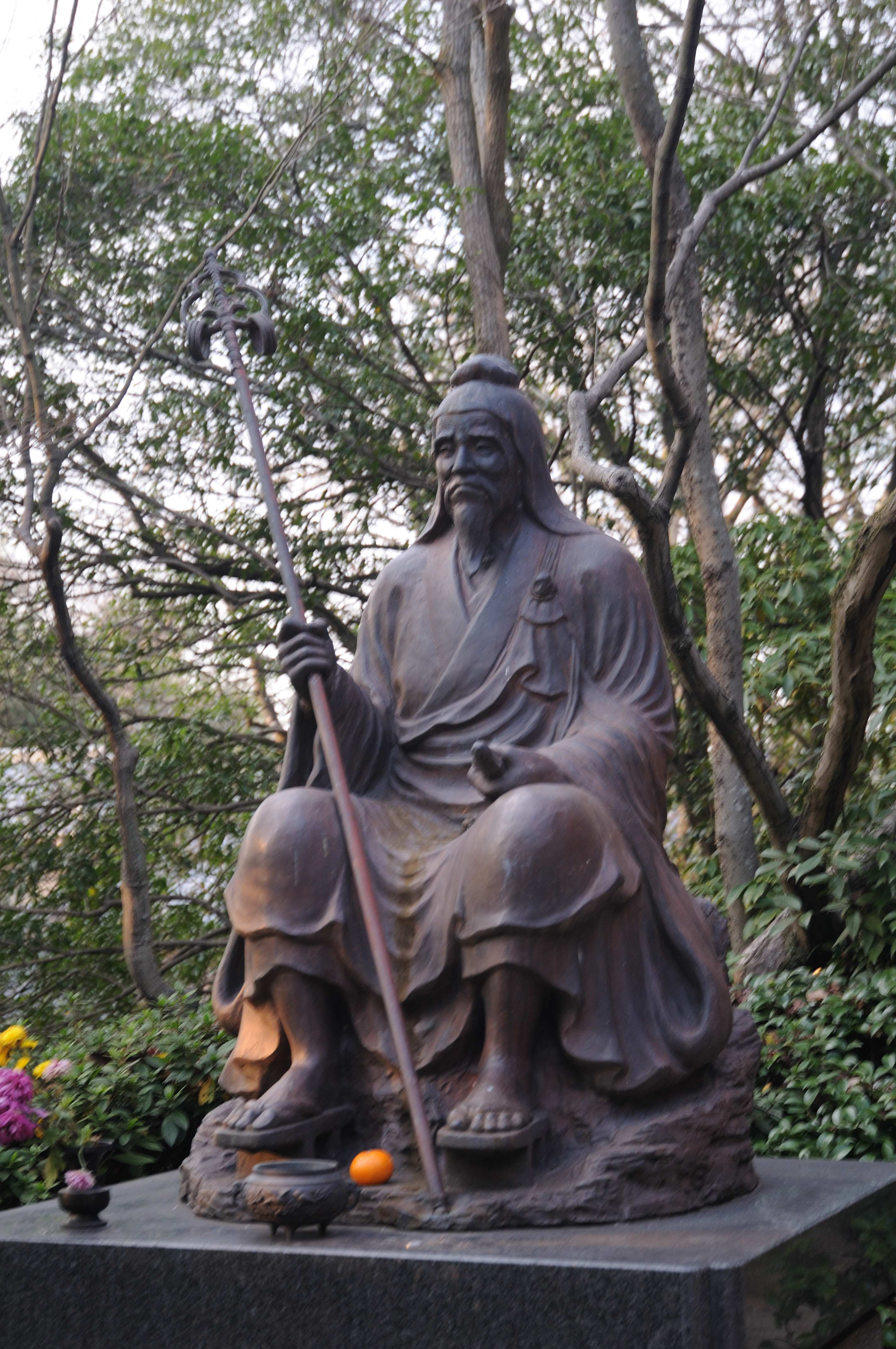 En-no-gyoja